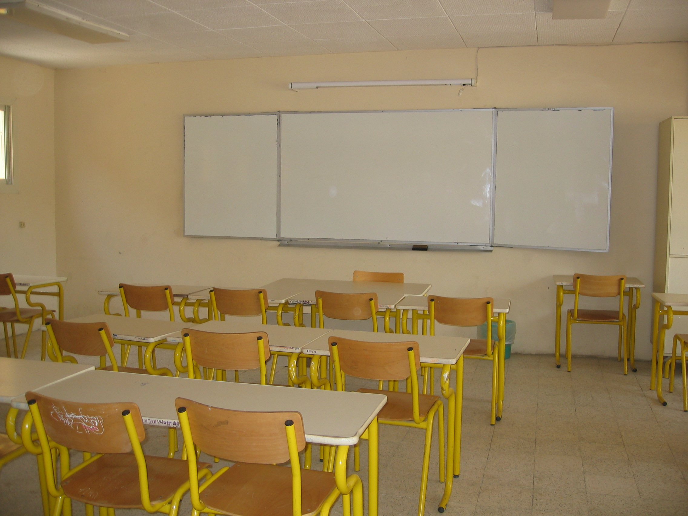 Une salle de classe au lycée français du Caire.